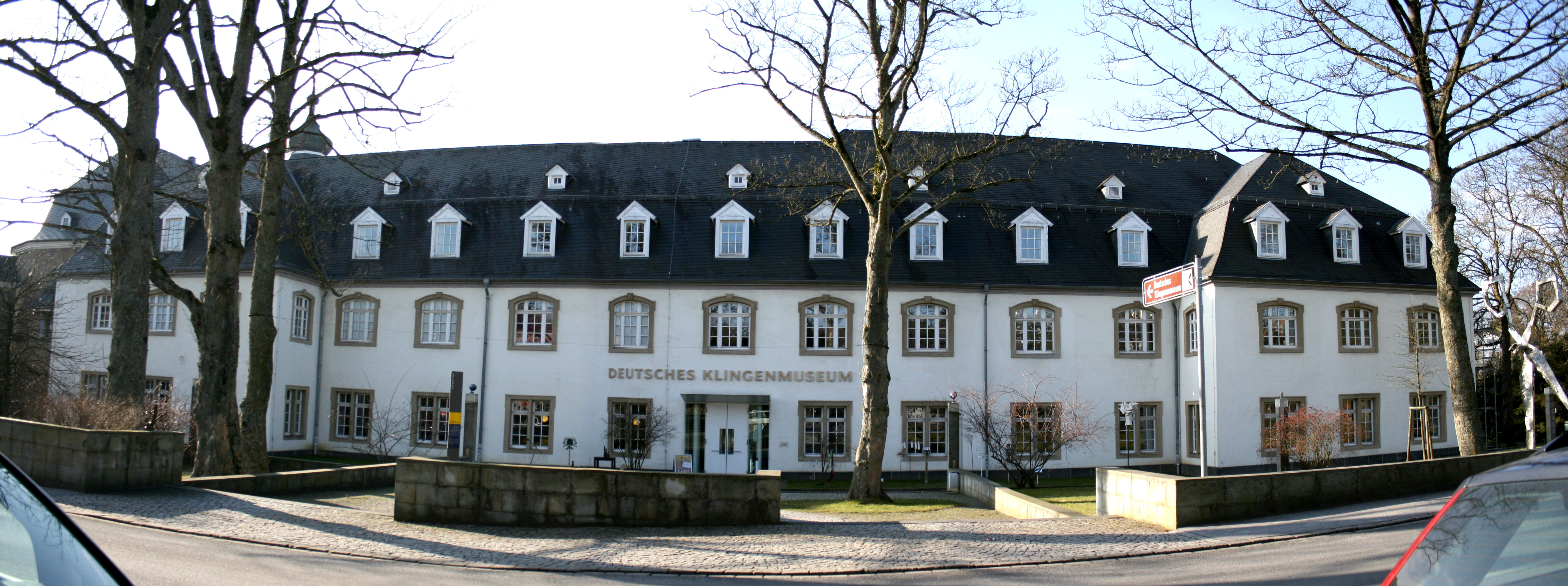 Deutsches Klingenmuseum in Solingen